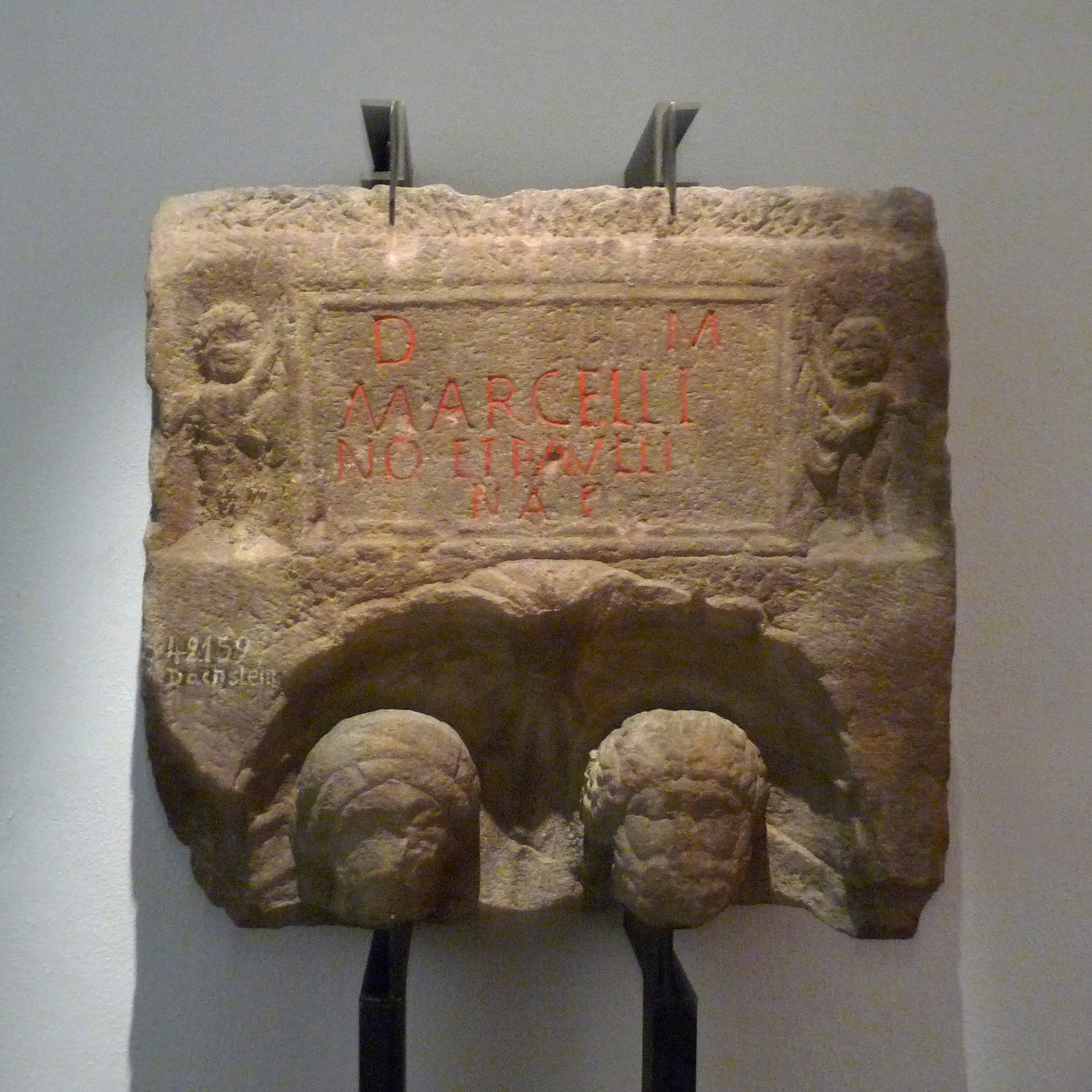 Stèle funéraire d'un couple, avec cartouche épigraphique tenu par deux Amours. Milieu du 3e s. après JC. Trouvée à Dachstein. Musée archéologique de Strasbourg